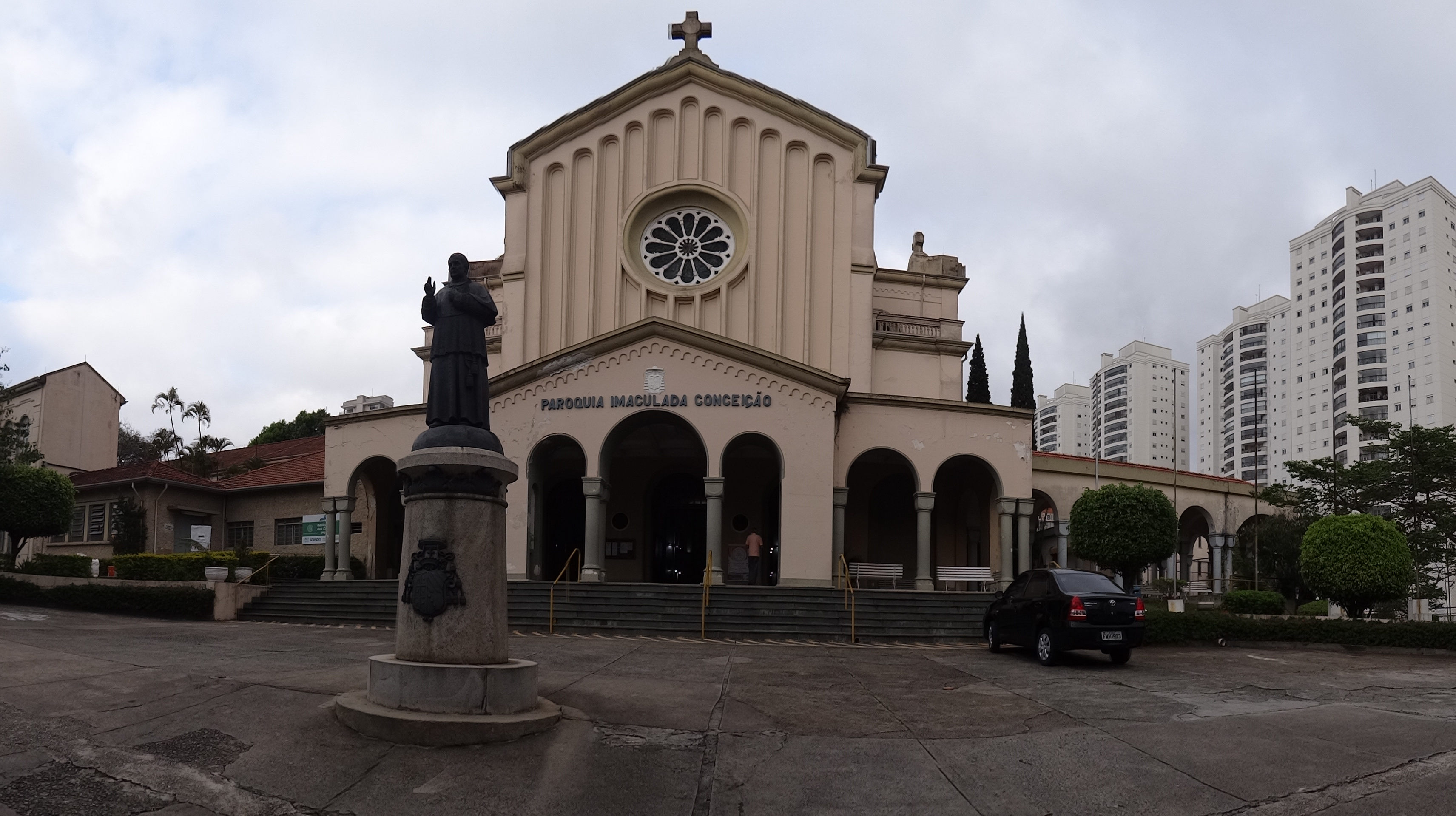 Panorâmica da entrada principal do Seminário Central do Ipiranga, São Paulo (SP), Brasil onde se localiza a Paróquia Imaculada Conceição.